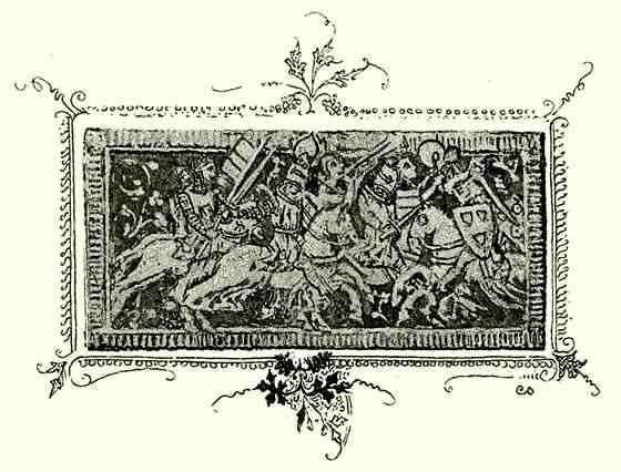 Csatajelenet az Anjou-korban a Nemzeti Múzeum kincstárában levő ékszerről rajzolta Cserna Károly.